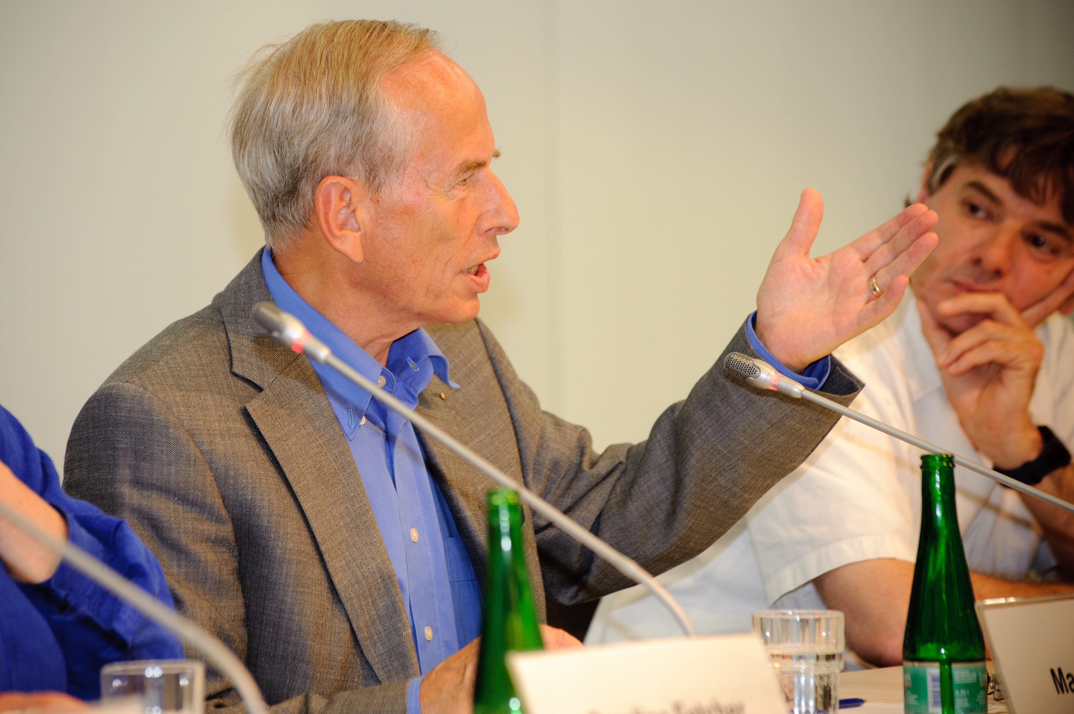 General Manfred Eisele, Generalmajor a. D. des Heeres der Bundeswehr und von 1994 bis 1998 Assistant Secretary General for Planning and Support of Peacekeeping Operations der Vereinten Nationen (UNO) Dieses Foto entstand auf der Podiumsdiskussion "Die UNO und der Völkermord von Srebrenica" am 5. Juli 2010 in der Heinrich-Böll-Stiftung in Berlin. Foto: Stephan Röhl